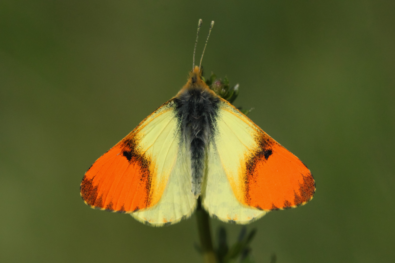 Östlicher Aurorafalter (Antchocharis damone) Männchen Oberseite